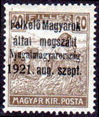 Почтовая марка Западной Венгрии из первой серии, 1919